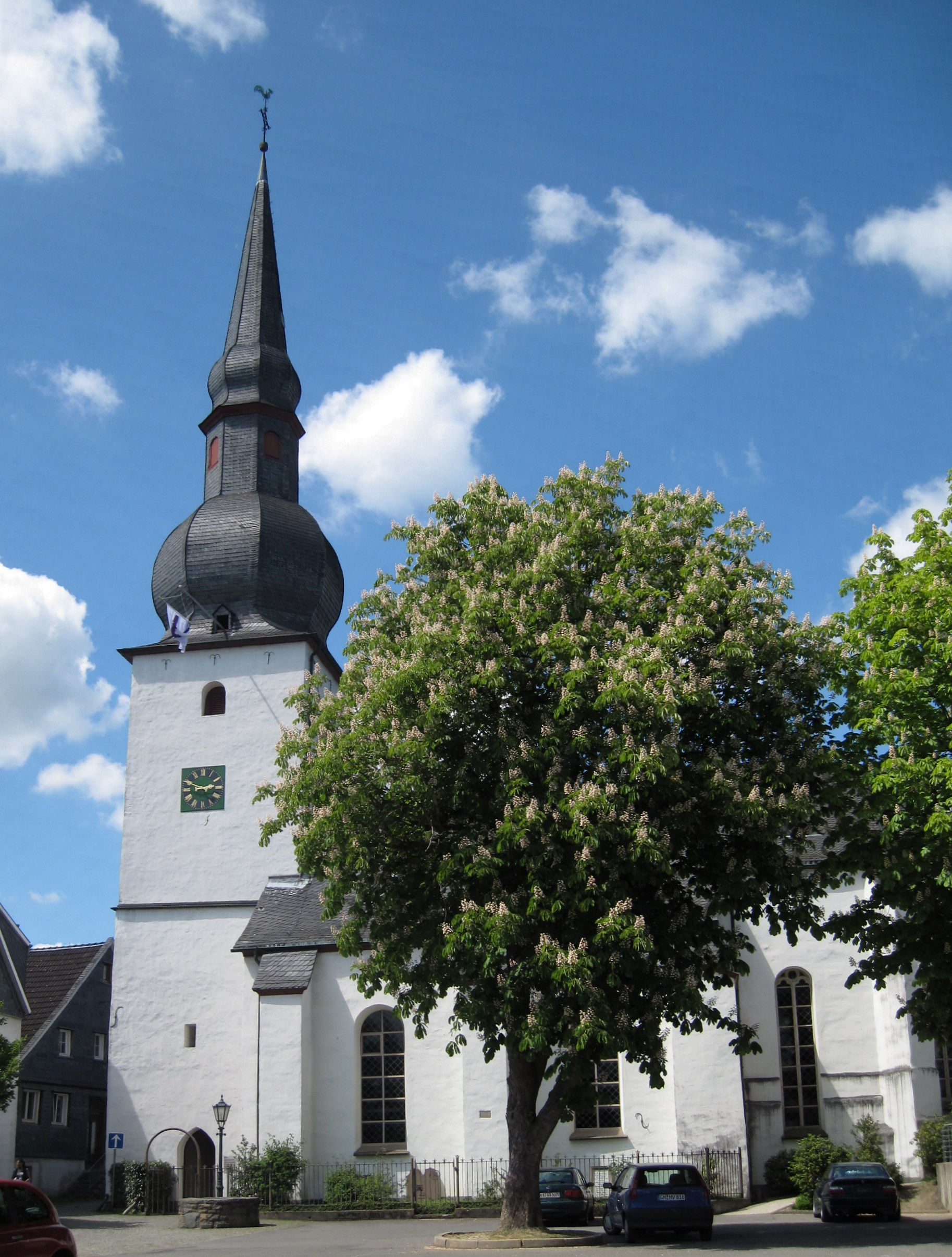 Evangelische Altstadtkirche, Kirchstraße 12 in Bergneustadt. Erbaut 1698. This image shows a heritage building in Germany, located in the North Rhine-Westphalian city Bergneustadt.